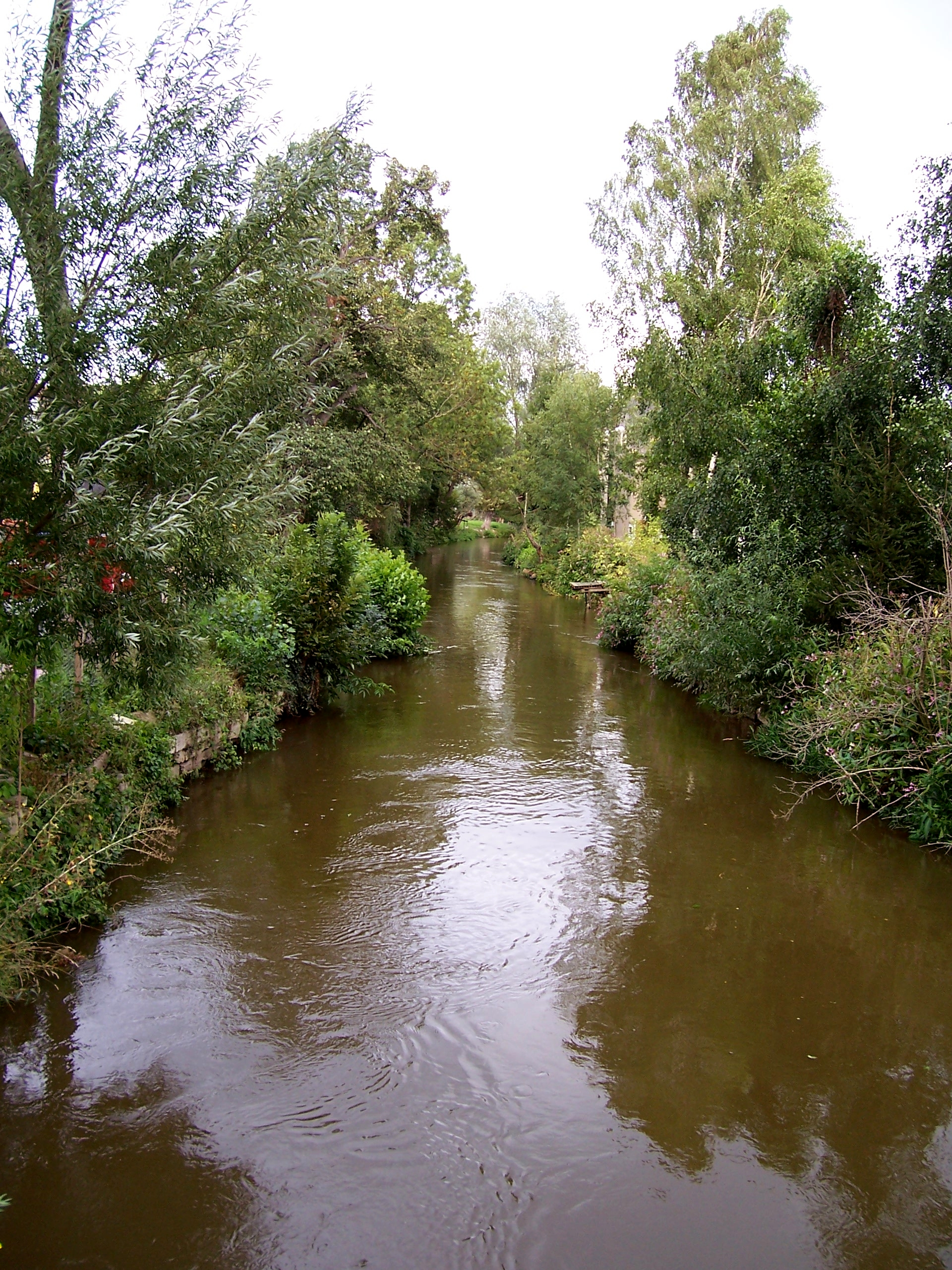 Elstermühlgraben bei Elstertrebnitz (Deutschland)